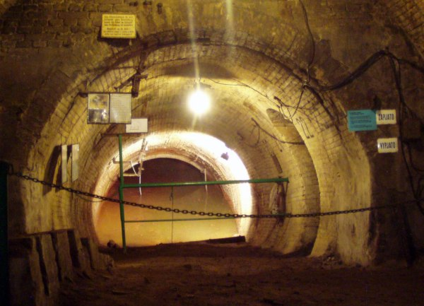 Mine, museum, Chrustenice, Czech Republic. Chrustenická šachta - většina dolu je dnes pod vodou